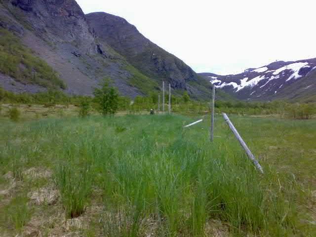 Skillefjord dalen sett fra veien